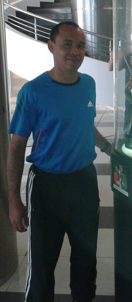 Luis Sanchez Arbitro